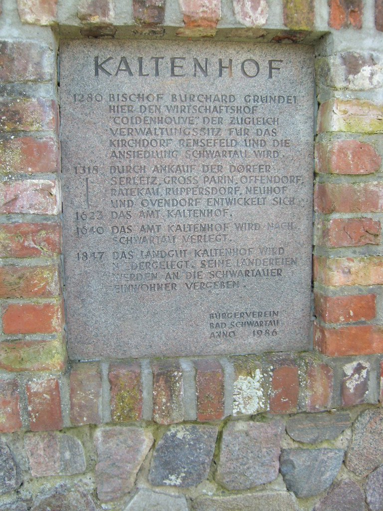 Erinnerungstafel für den mittelalterlichen Kaltenhof bei Bad Schwartau